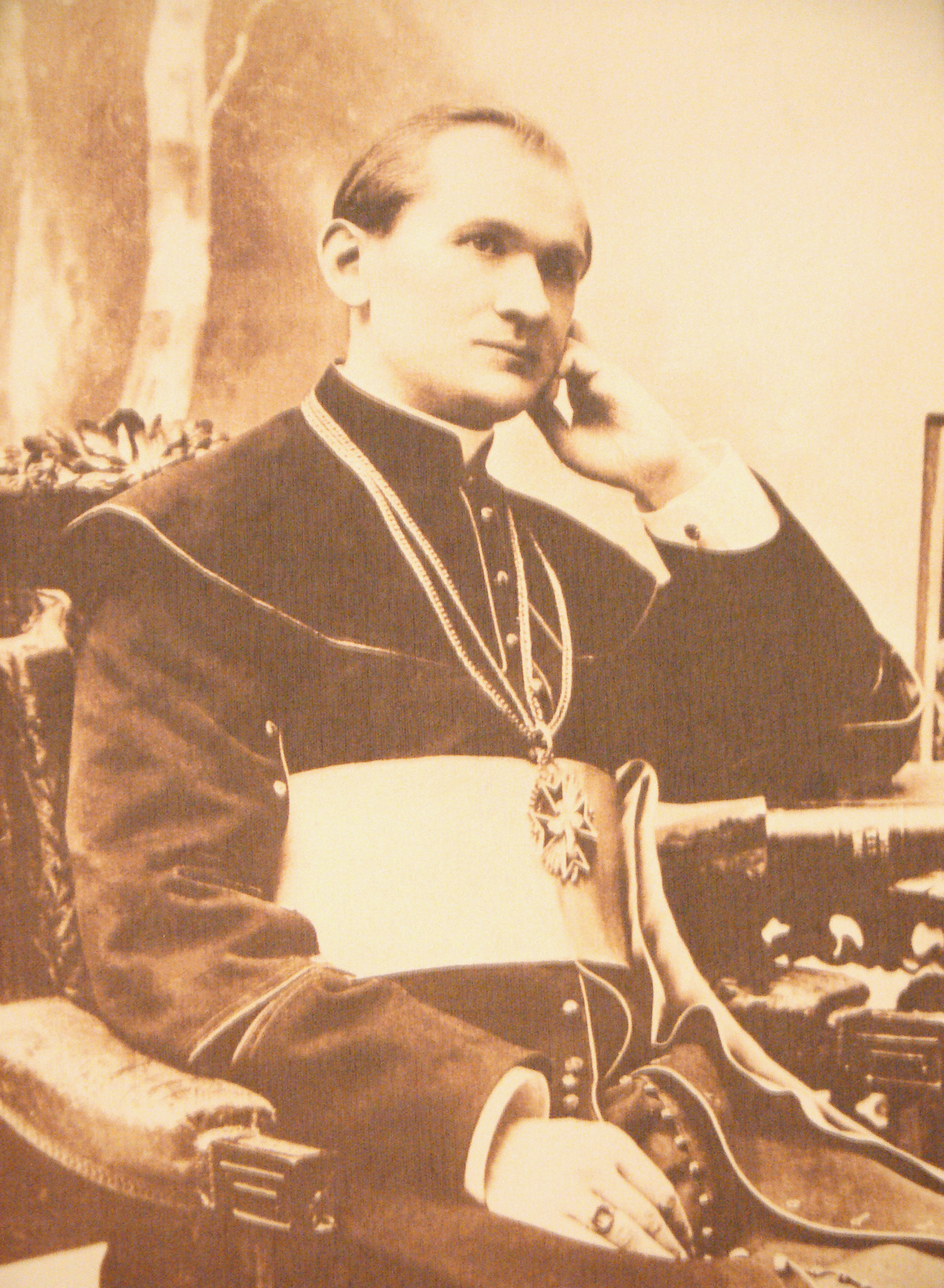 idzi radziszewski